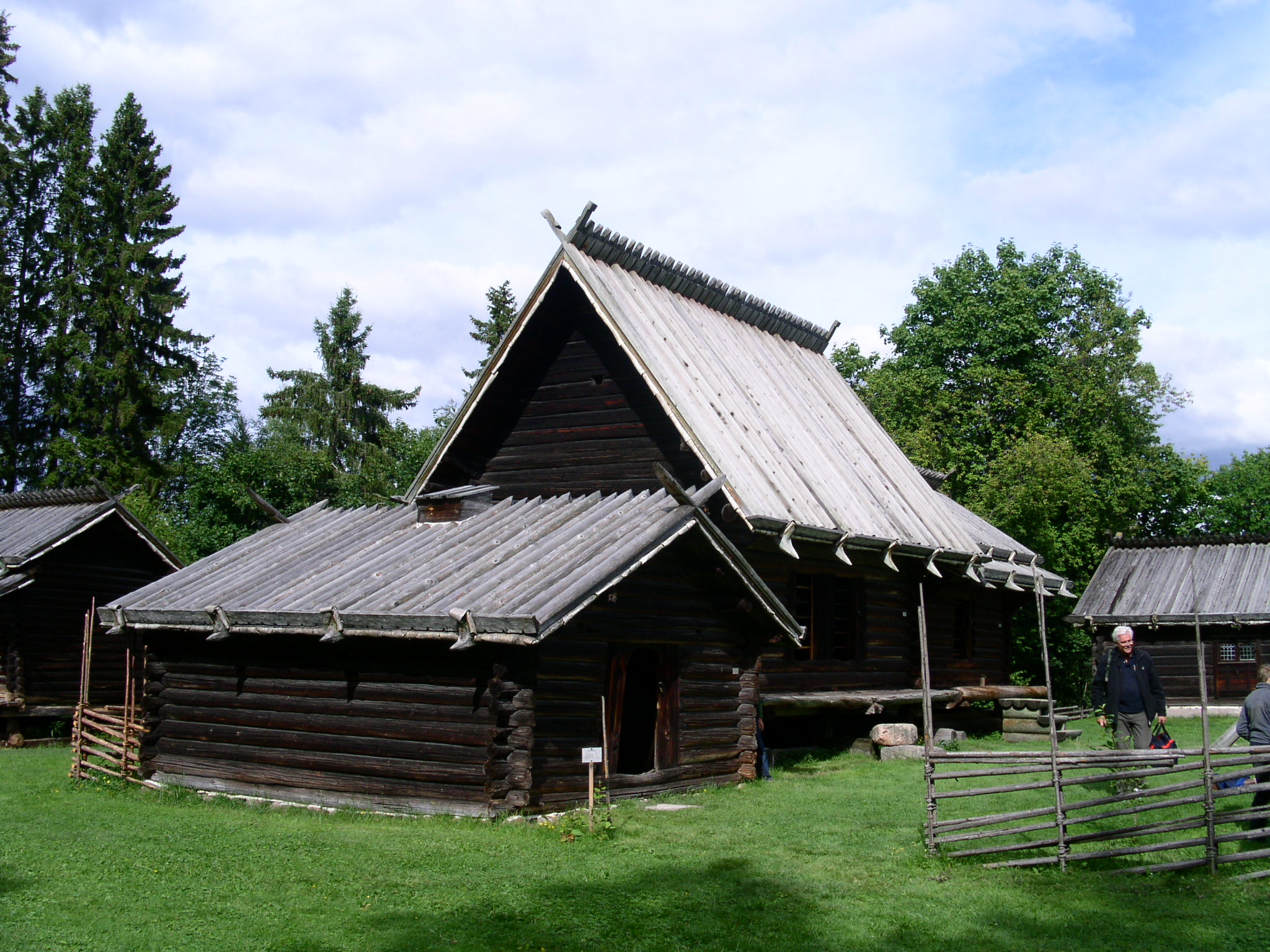 Eldhuset och ett dubbelhärbre från 1300-talet vid Zoorns gammelgård i Mora